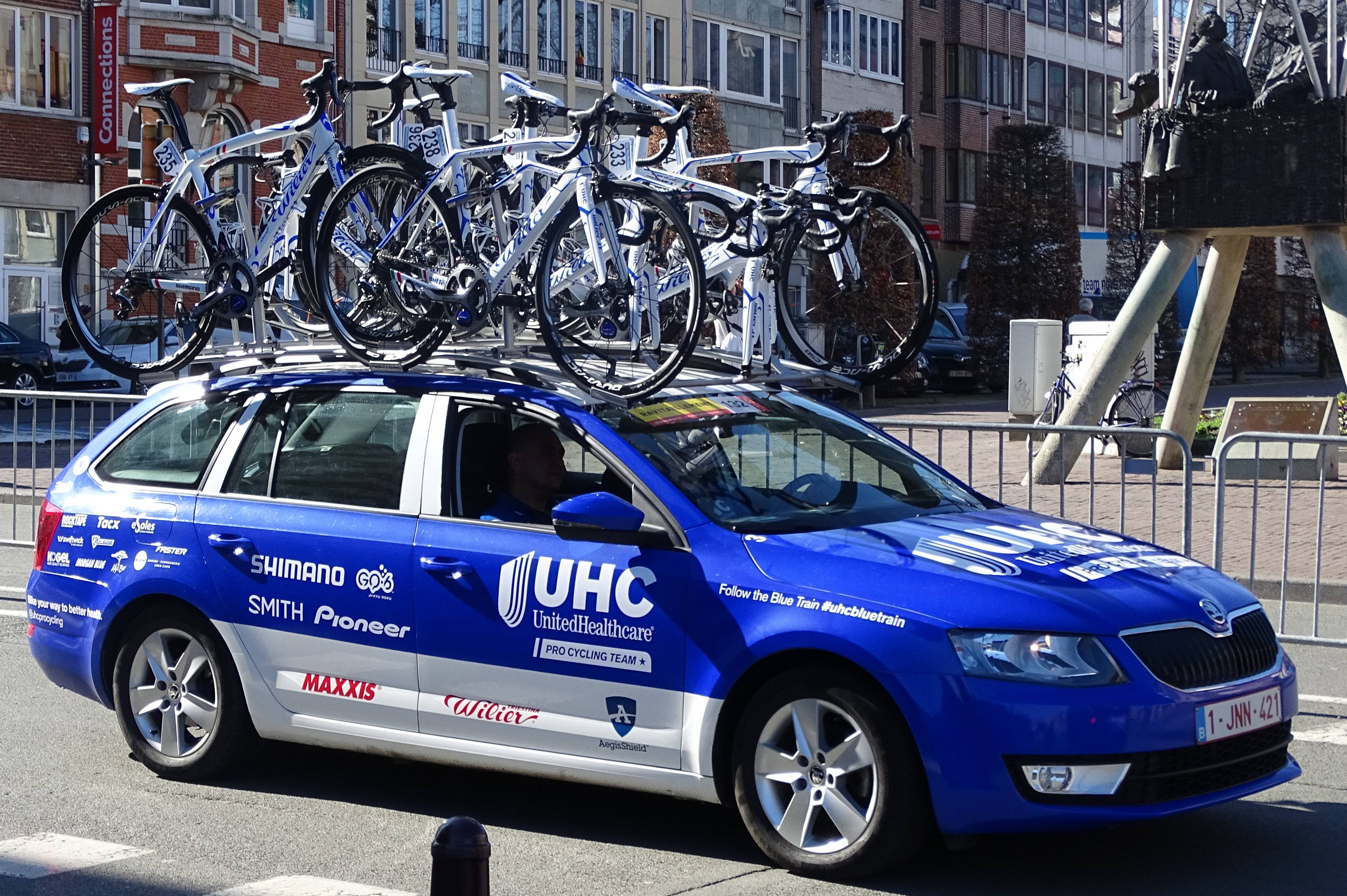 Reportage réalisé le mercredi 15 avril à l'occasion du départ de la Flèche brabançonne 2015 à Louvain, Belgique.